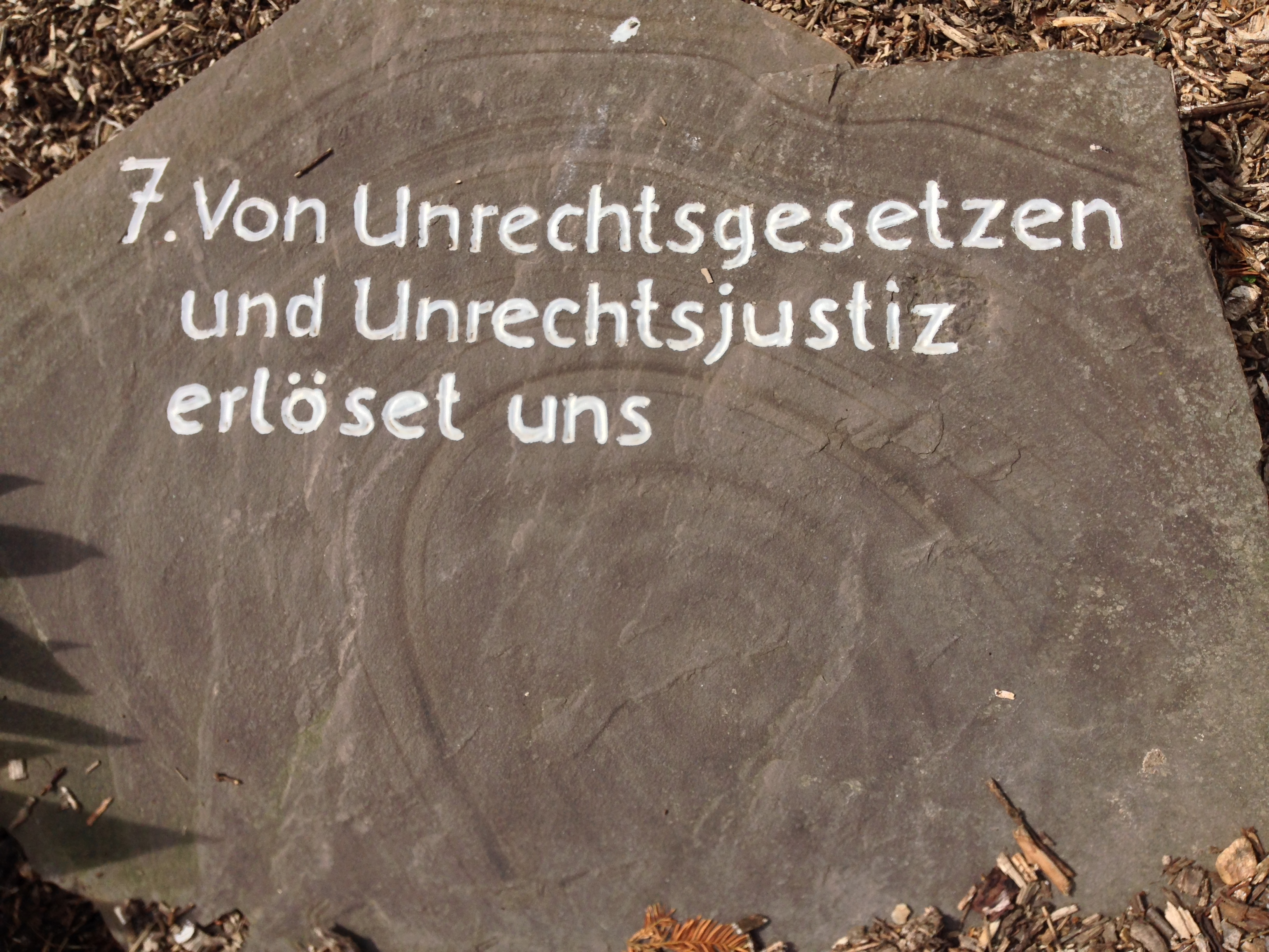 Gebotstafel 7